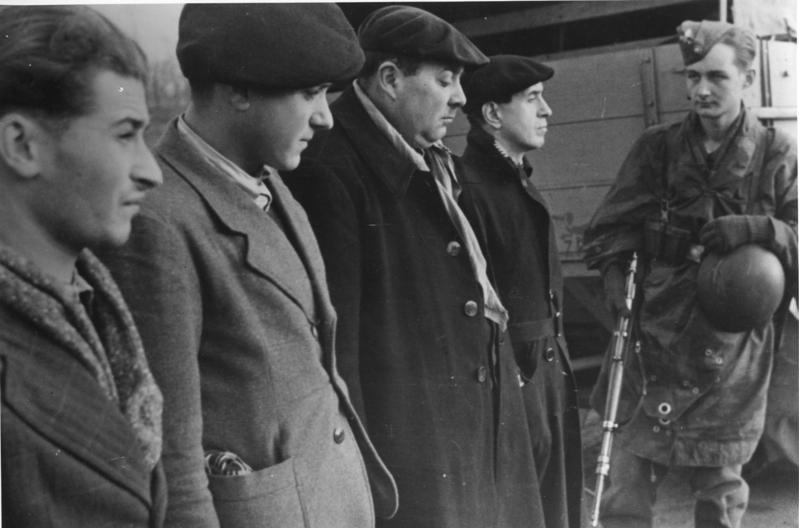 This description has been identified as biased or incorrect: Original Nazi-propaganda descriptionDer rote Maquis in Frankreich Festgenommene Terroristen vor ihrem Abtransport. Die Anführer der Banden sind Juden, geflüchtete Rotspanier und englische Agenten, die meist gut gekleidet und mit großen Geldsummen versehen sind. Ihre Gefolgsmänner rekrutieren sich fast ausschließlich aus arbeitscheuem Gesindel.